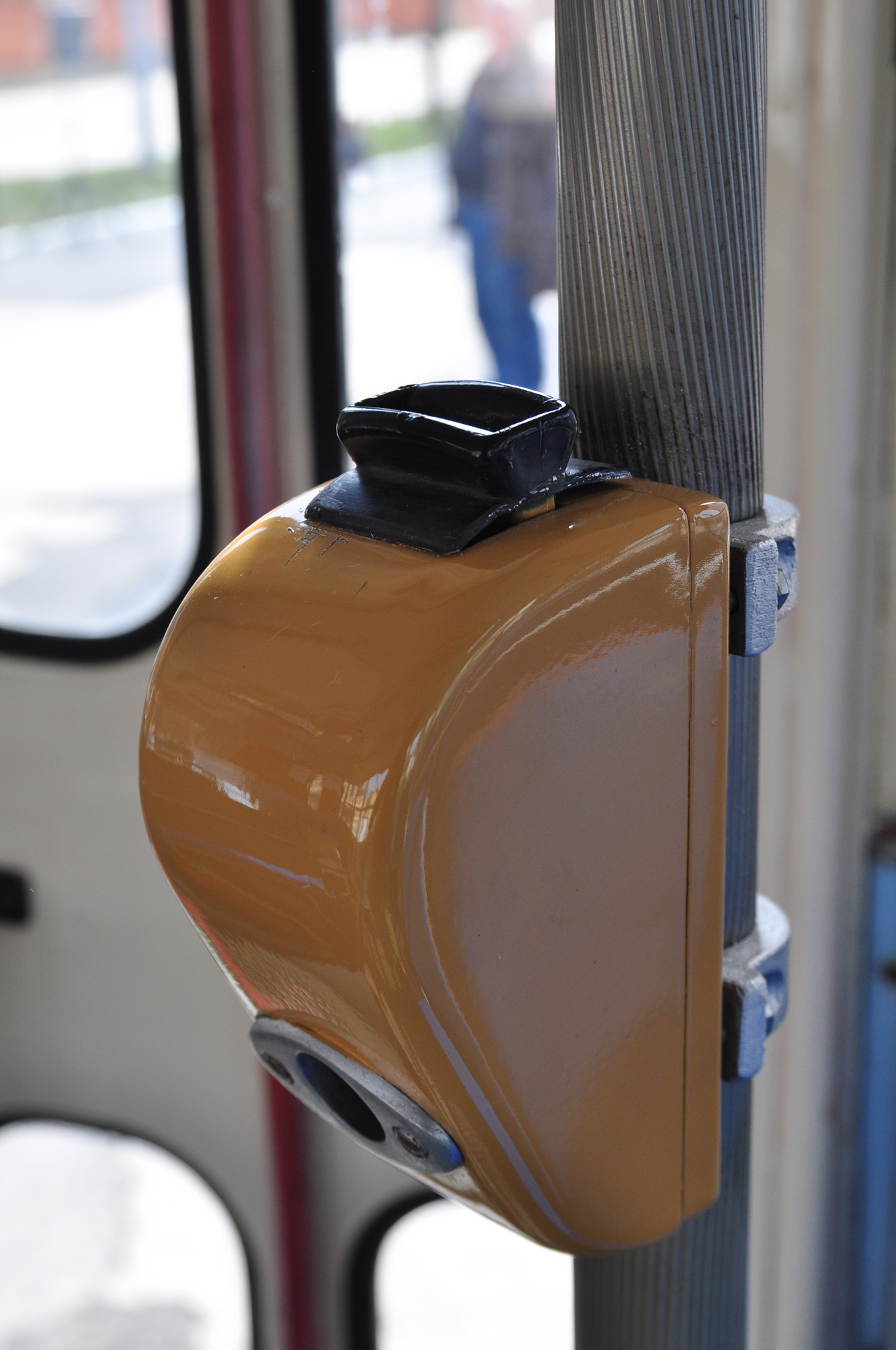 Prevádzka trolejbusovej trate Pražská - Hroboňova